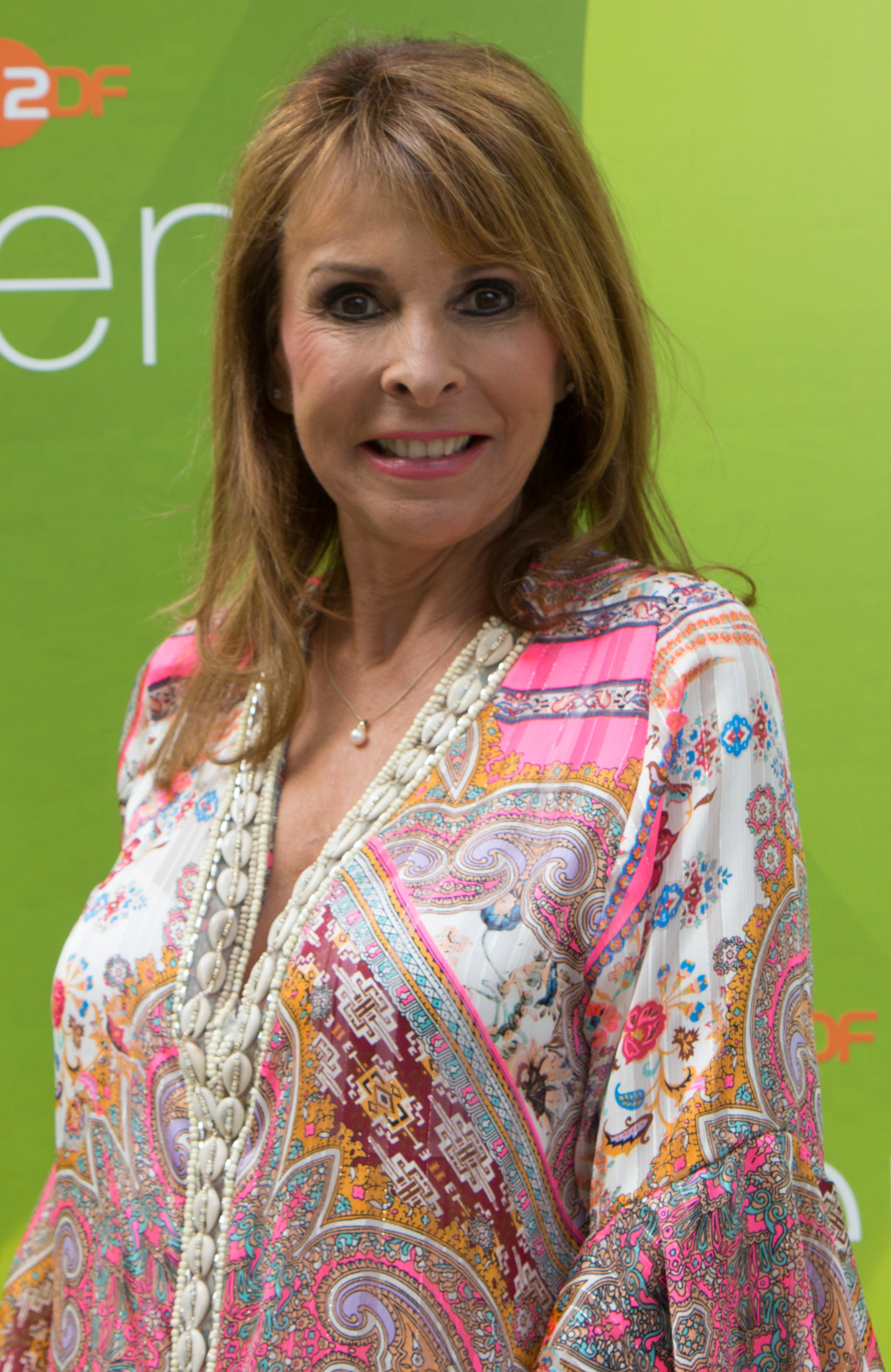 Ireen Sheer als Gast im ZDF-Fernsehgarten am 9. September 2018 in Mainz.